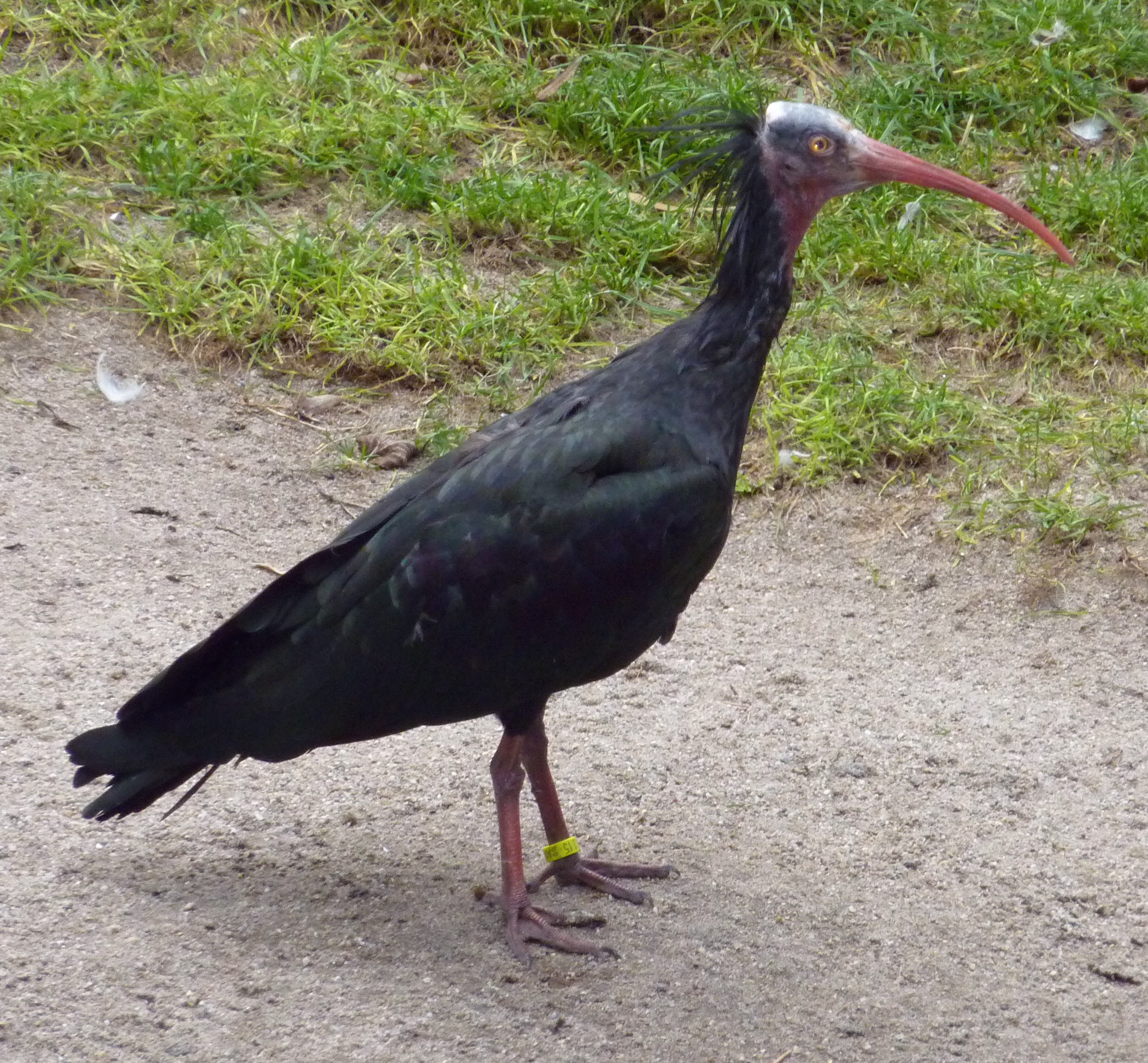 Waldrapp im Heidelberger Zoo